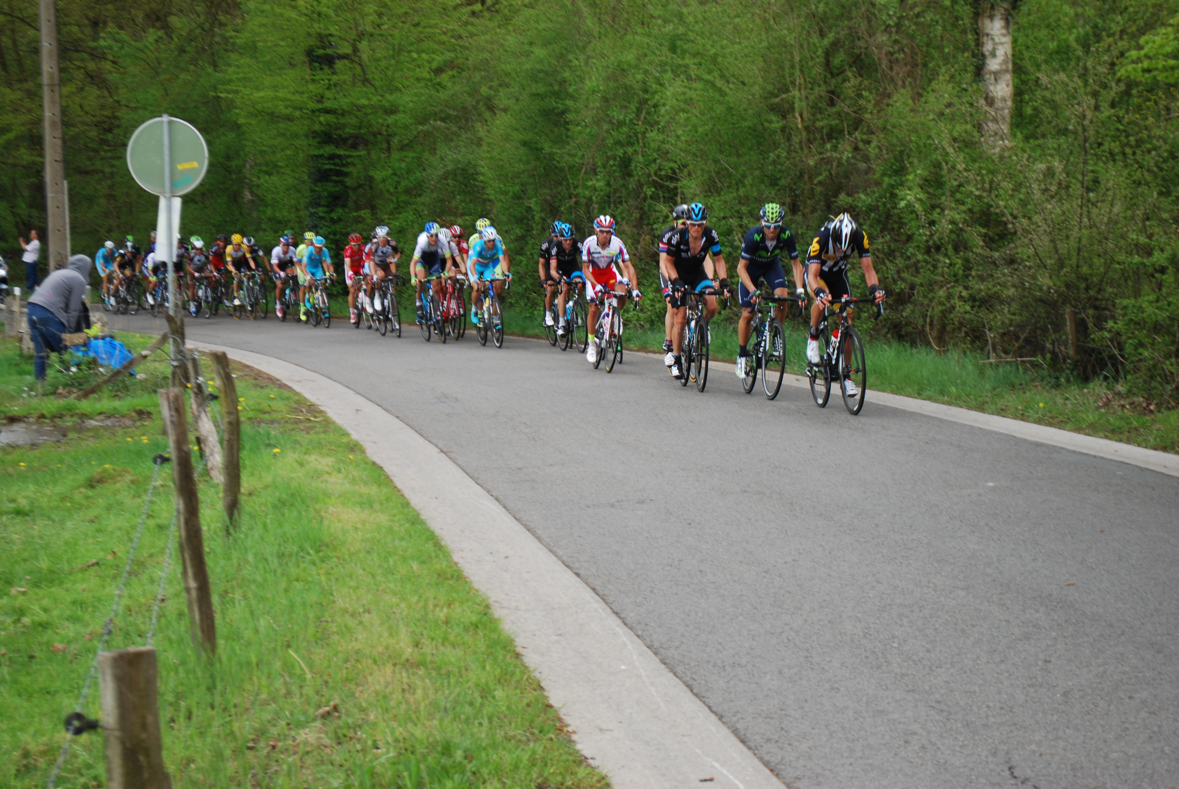 Vue de la course cycliste "Liège-Bastogne-Liège" au sommet de la côte de la Roche aux Faucons, à Esneux, le dimanche 26 avril 2015.